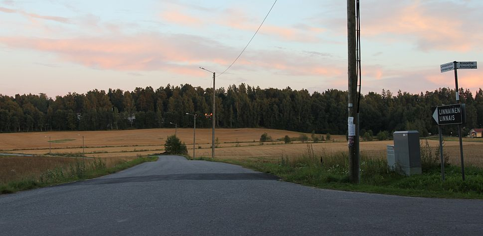 Linnaistentien pohjoispäätä Vantaalla. Taustalla sijaitsevassa metsässä on Linnaisten omakotivaltainen asuinalue. Huom: Muista säilyttää viittaus kuvaajaan, mikäli käytät kuvaa.